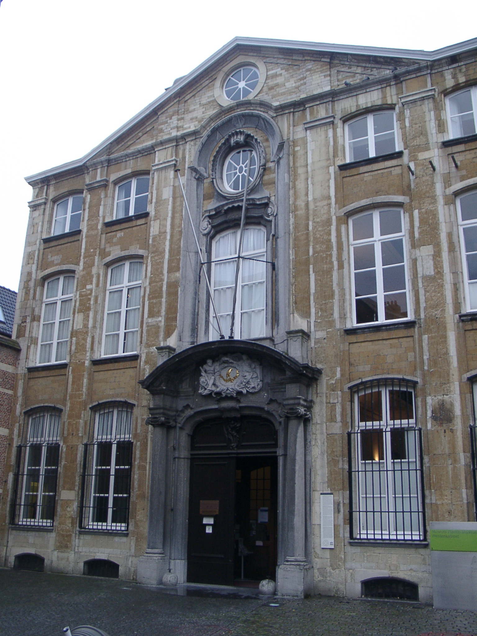 Museum Plantin-Moretus Antwerp